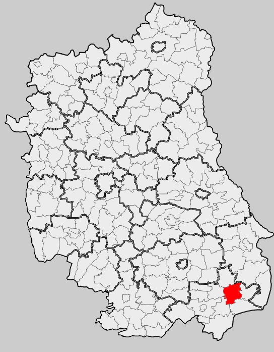 Map of gmina Łaszczów, Tomaszów Lubelski county, Lublin voivodship Mapa gminy Łaszczów, powiat tomaszowski, województwo lubelskie